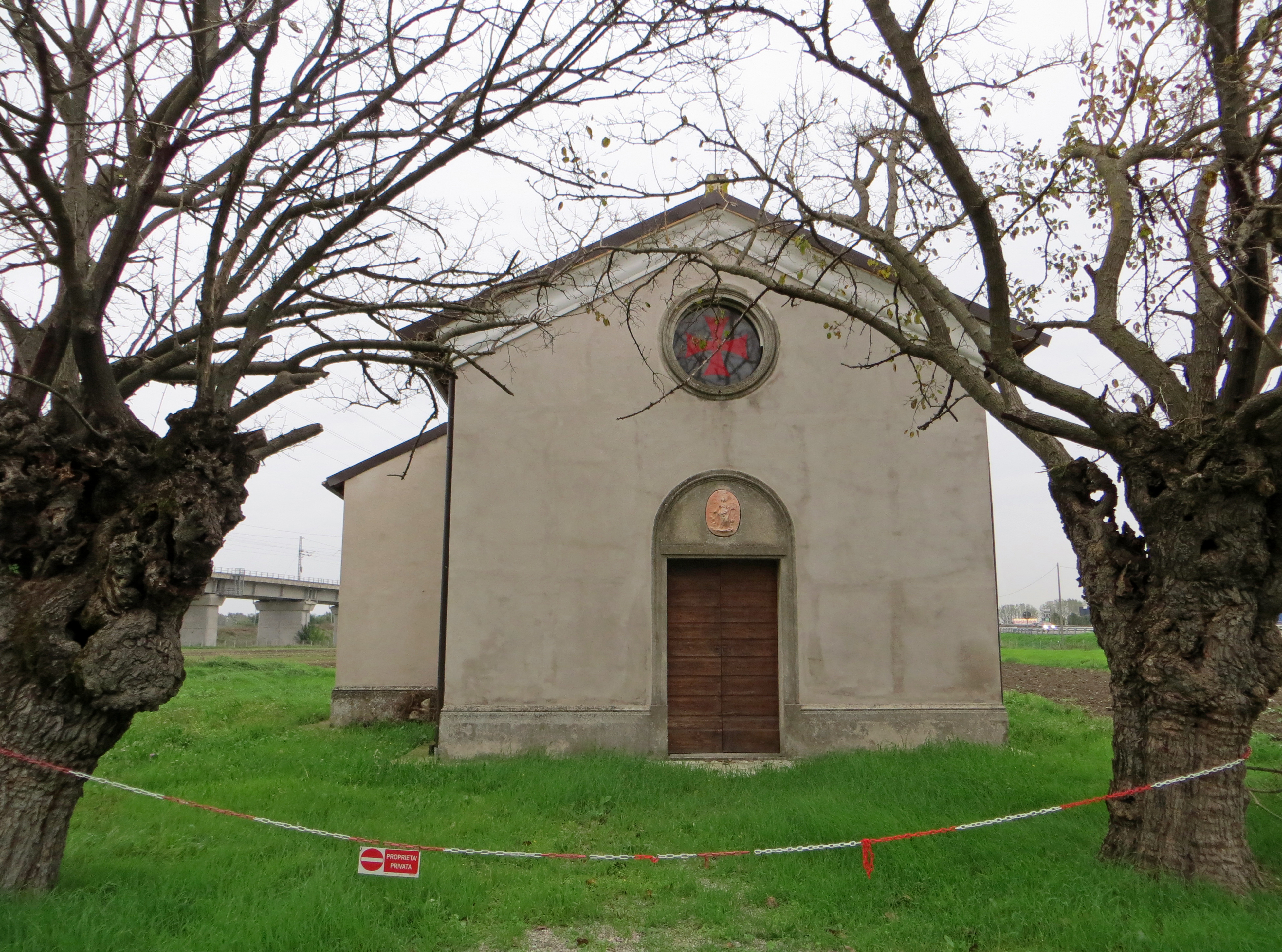 Facciata dell'oratorio della Concezione di Maria Vergine